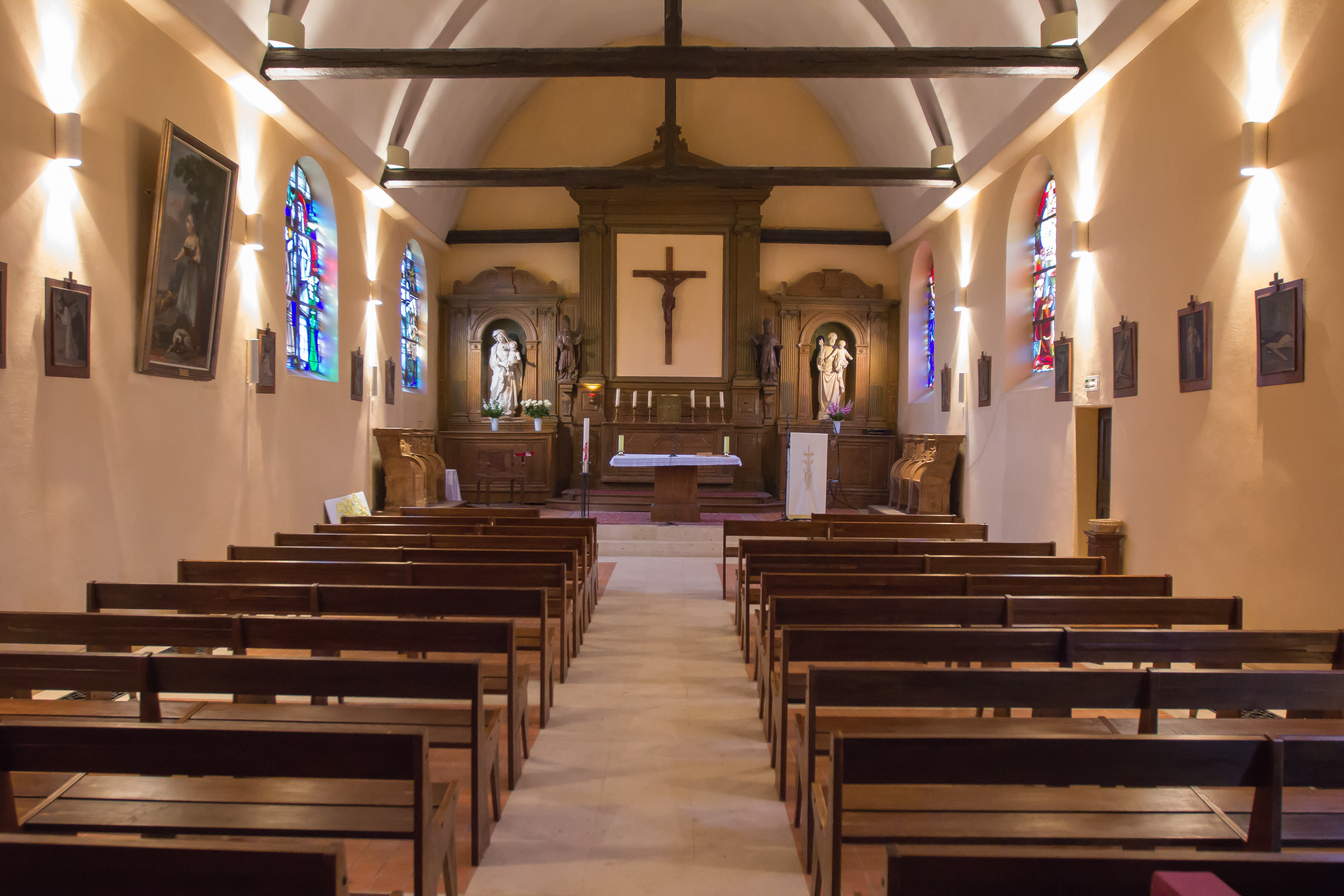 Intérieur de l'église de Villabé / Villabé / Essonne / France